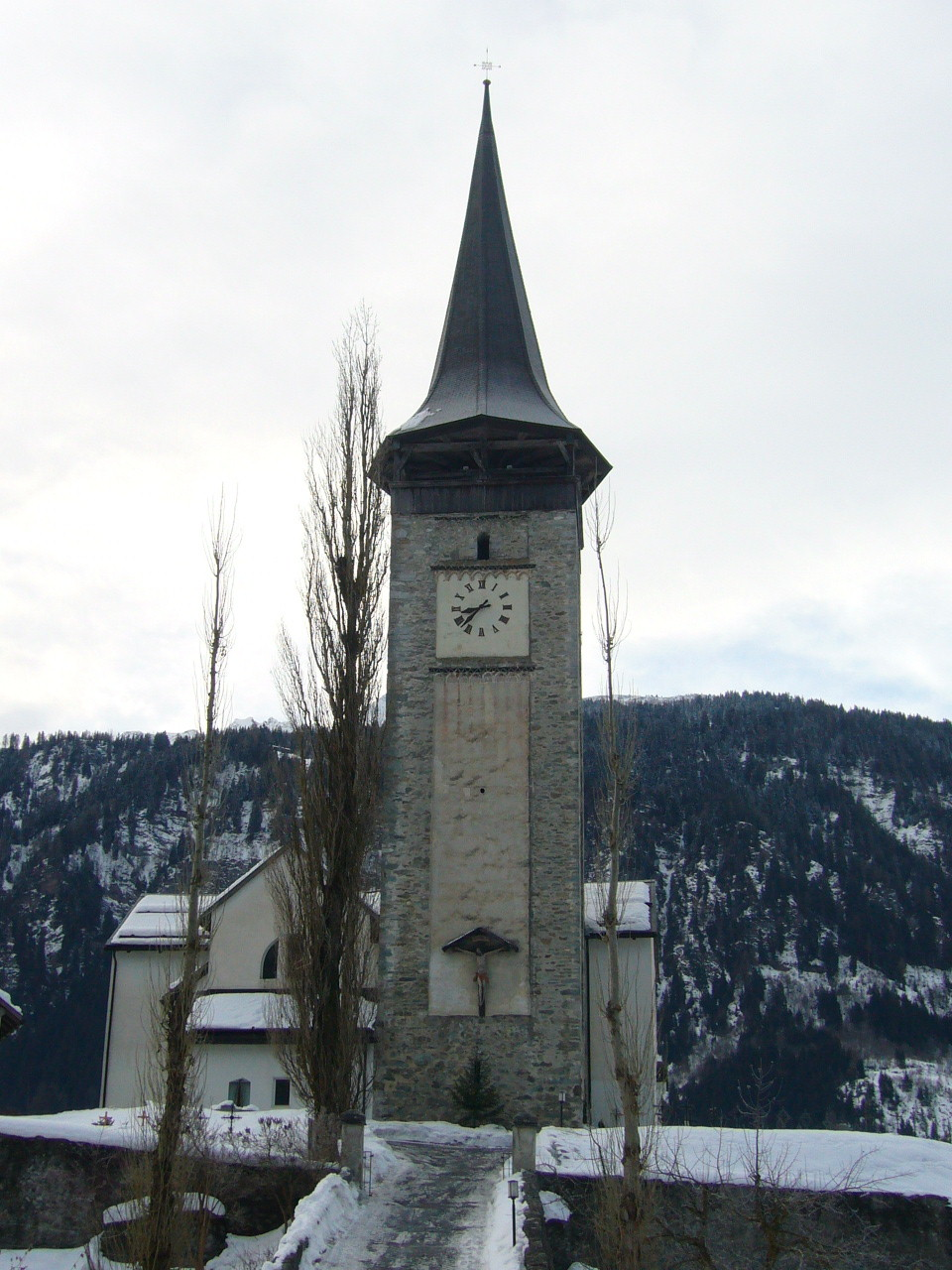 Sagogn, Katholische Kirche. Kanton Graubünden, Schweiz.